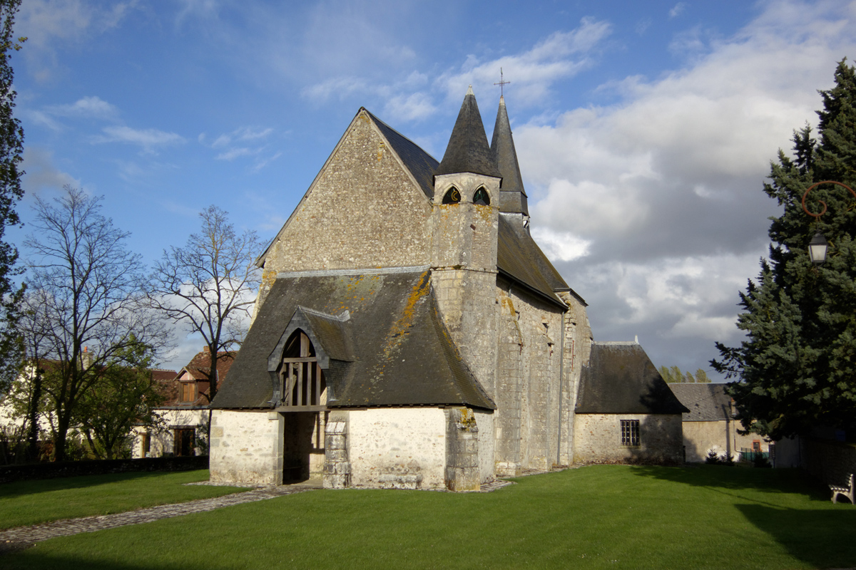 Eglise Saint-Cloud à Rhodon